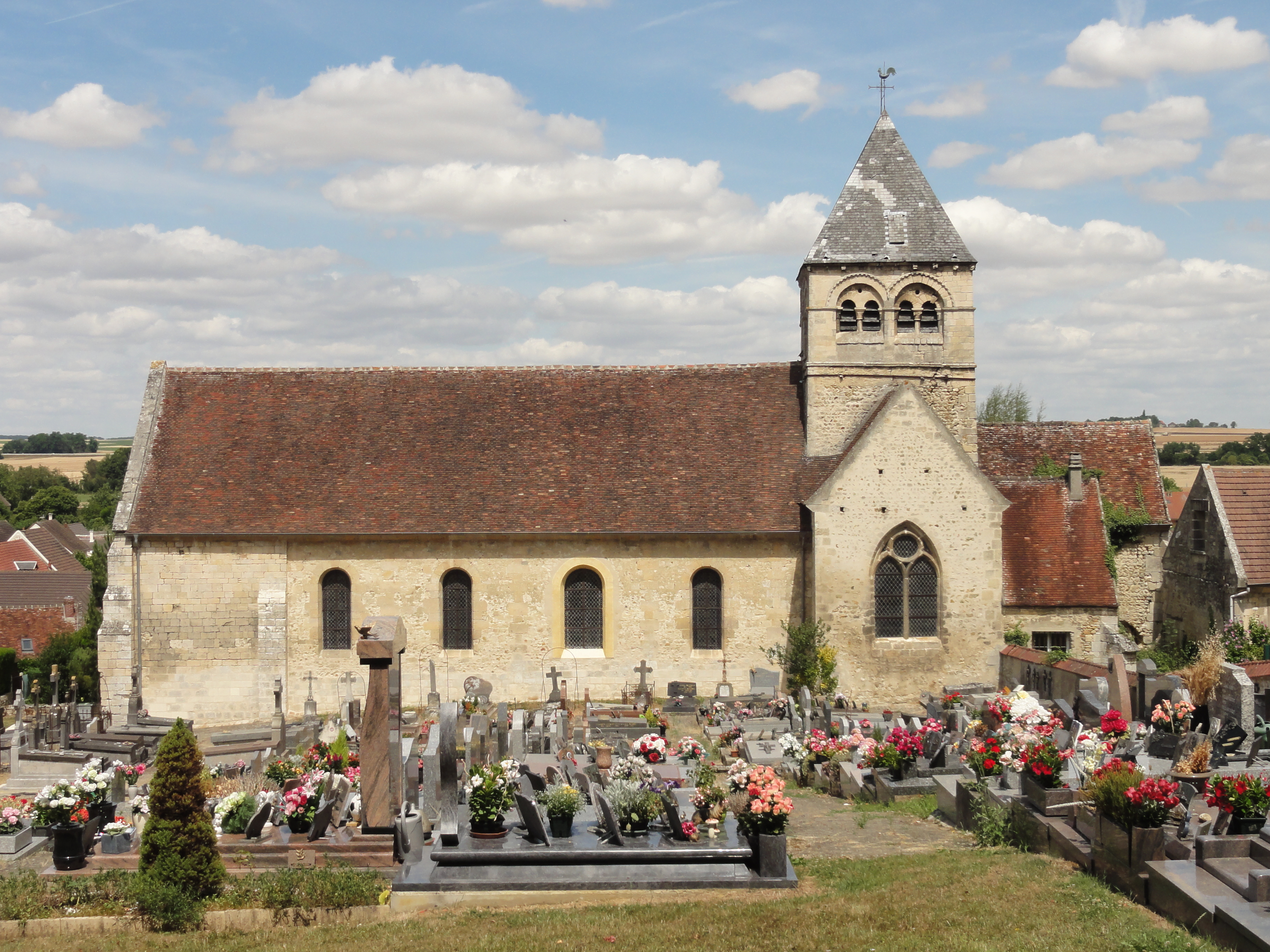 Église Saint-Michel-et-Saint-Vaast de Catenoy (voir titre).